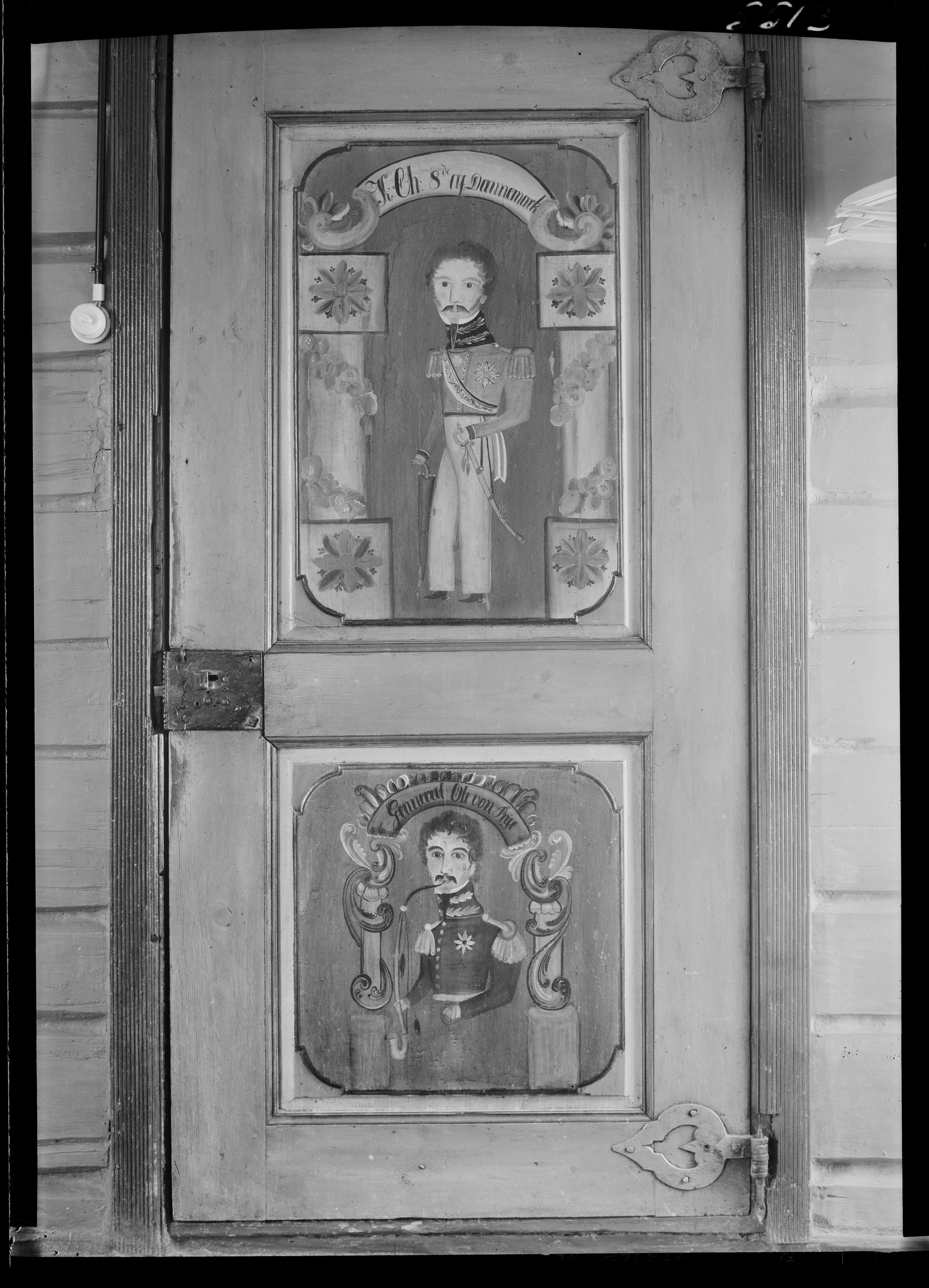 Bildet er hentet fra Nasjonalbibliotekets bildesamling. Anmerkninger til bildet var: Fotograf : ukjent Nordre Vik, Nissedal, Telemark